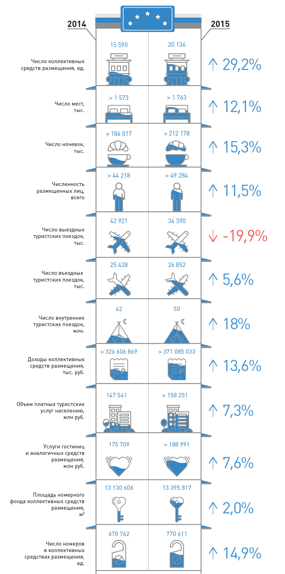 Внутренний и въездной туризм в России. Сравнительная статистическая информация за 2014/2015 год по данным Росстата и Ростуризма